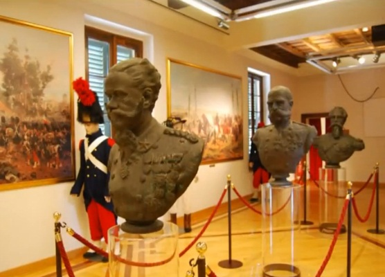 La sala principale del museo della battaglia di Magenta a Magenta (MI) - Italy